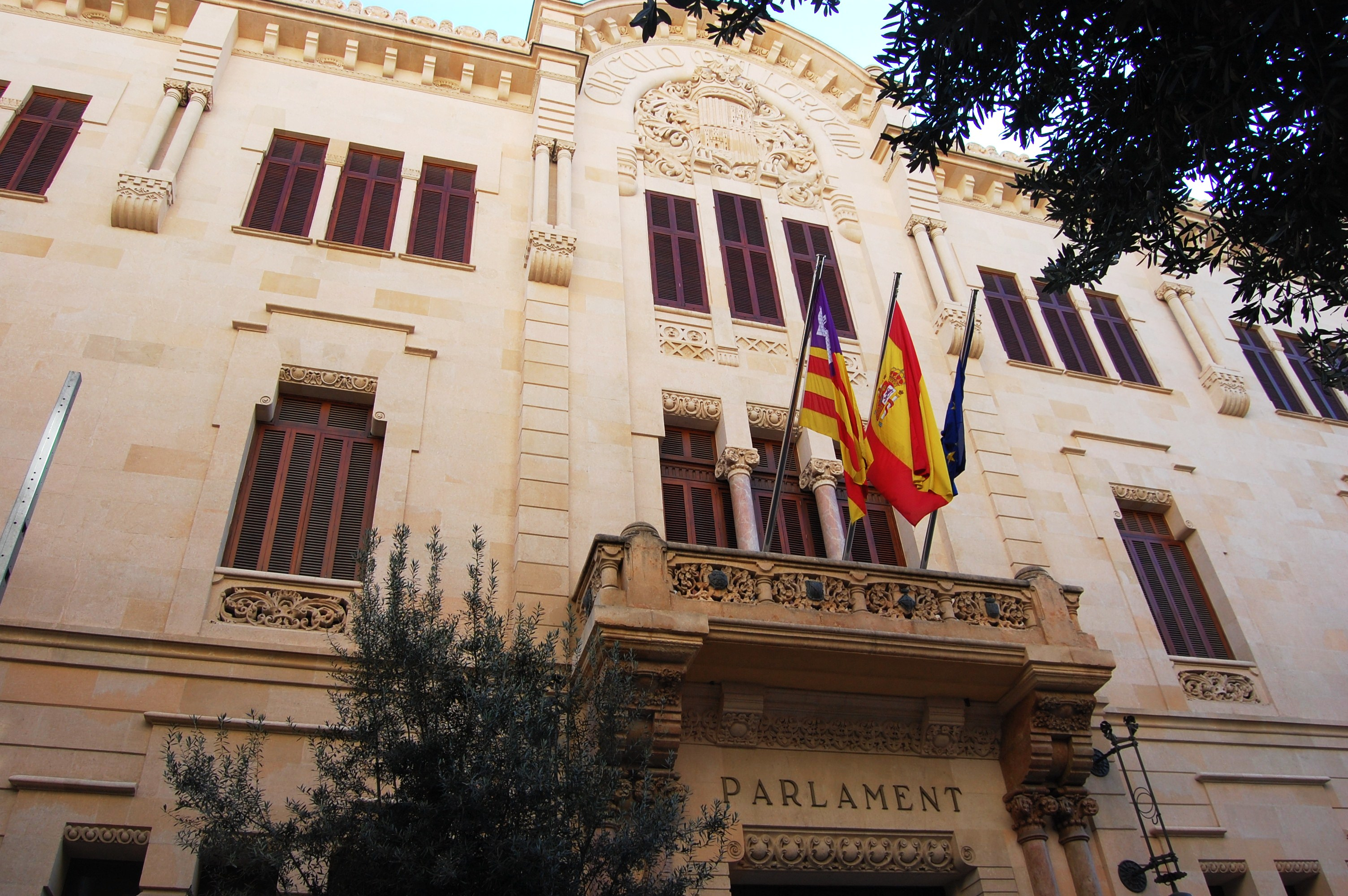 Círculo Mallorquín (Palma)